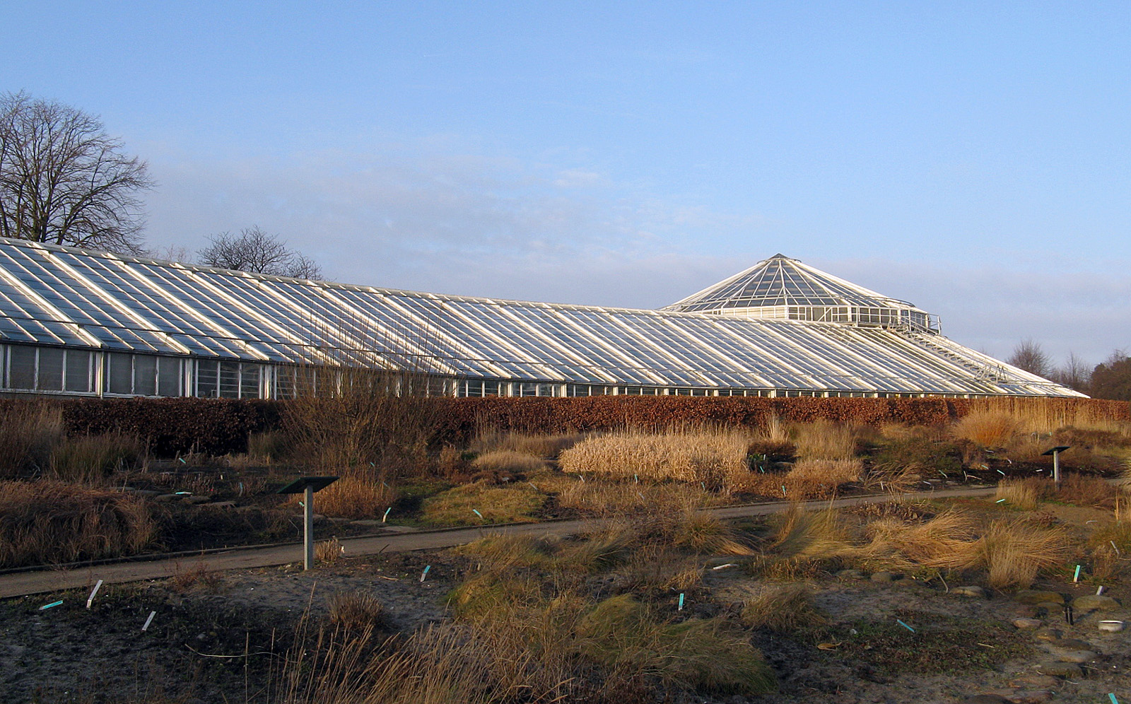 Væksthuset i Botanisk Have i Århus